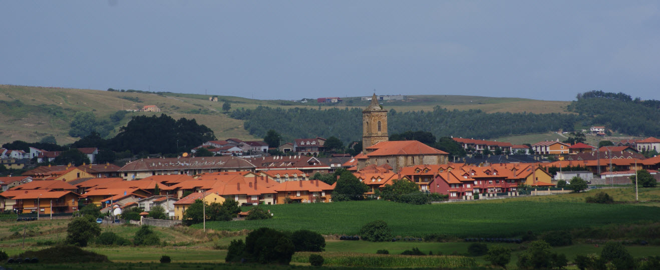 Vista de Ajo desde la iglesia de Santa María de Bareyo.